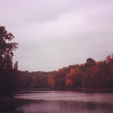 Fall in Mississippi